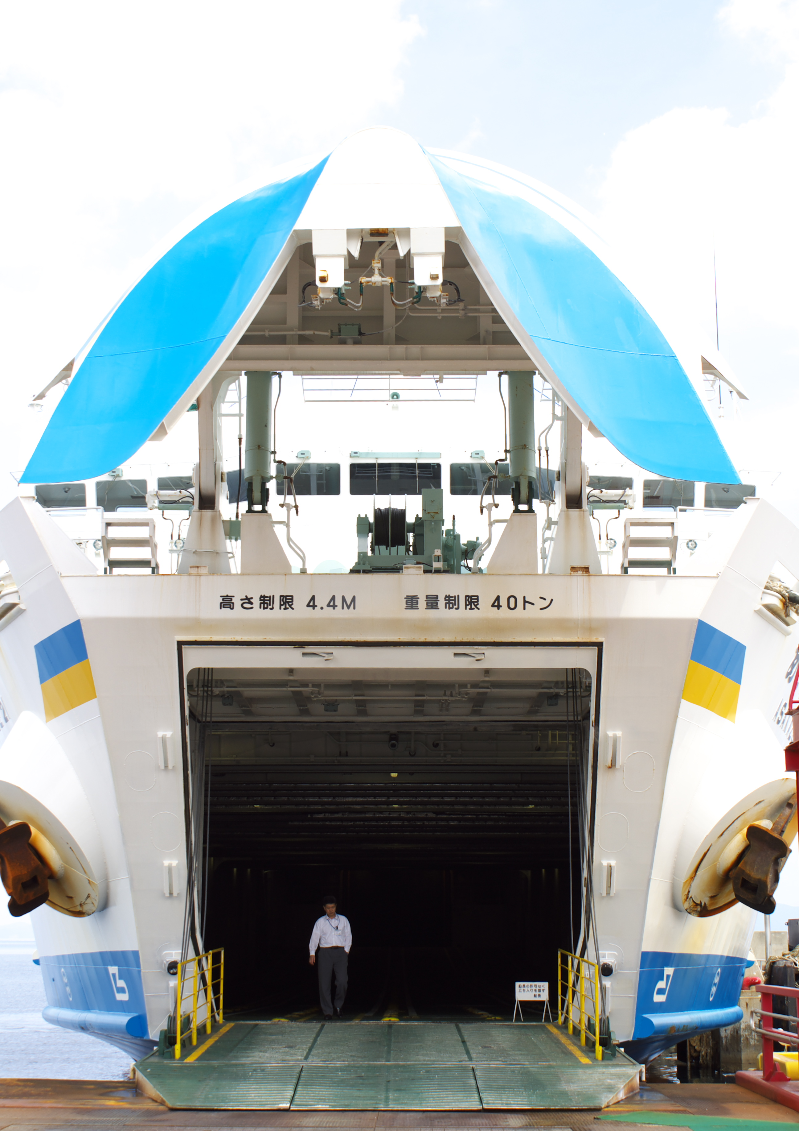 青森港フェリーターミナルに接岸中の青函フェリー「あさかぜ21」船首、2009年8月15日撮影。